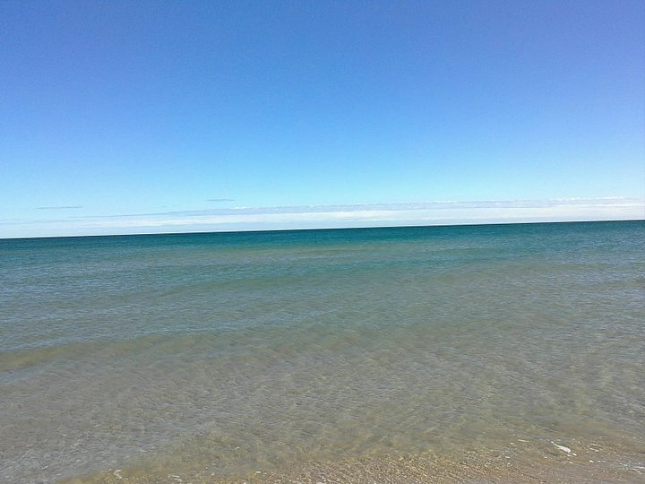 Aguas cristalinas de la Playa del Rei